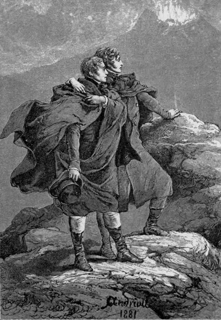 Adam Mickiewicz z Antonim Edwardem Odyńcem na Wezuwiuszu